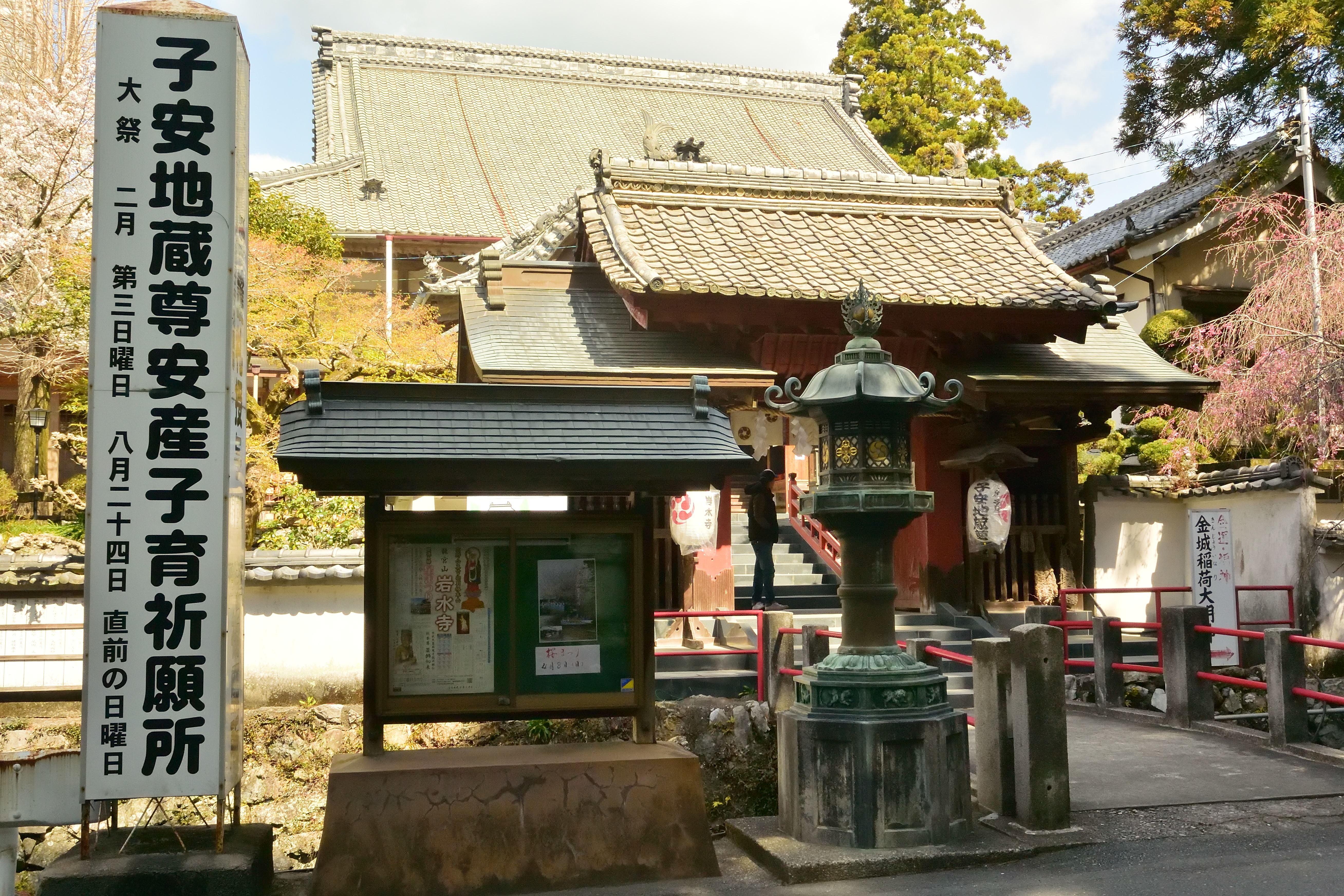 岩水寺 山門